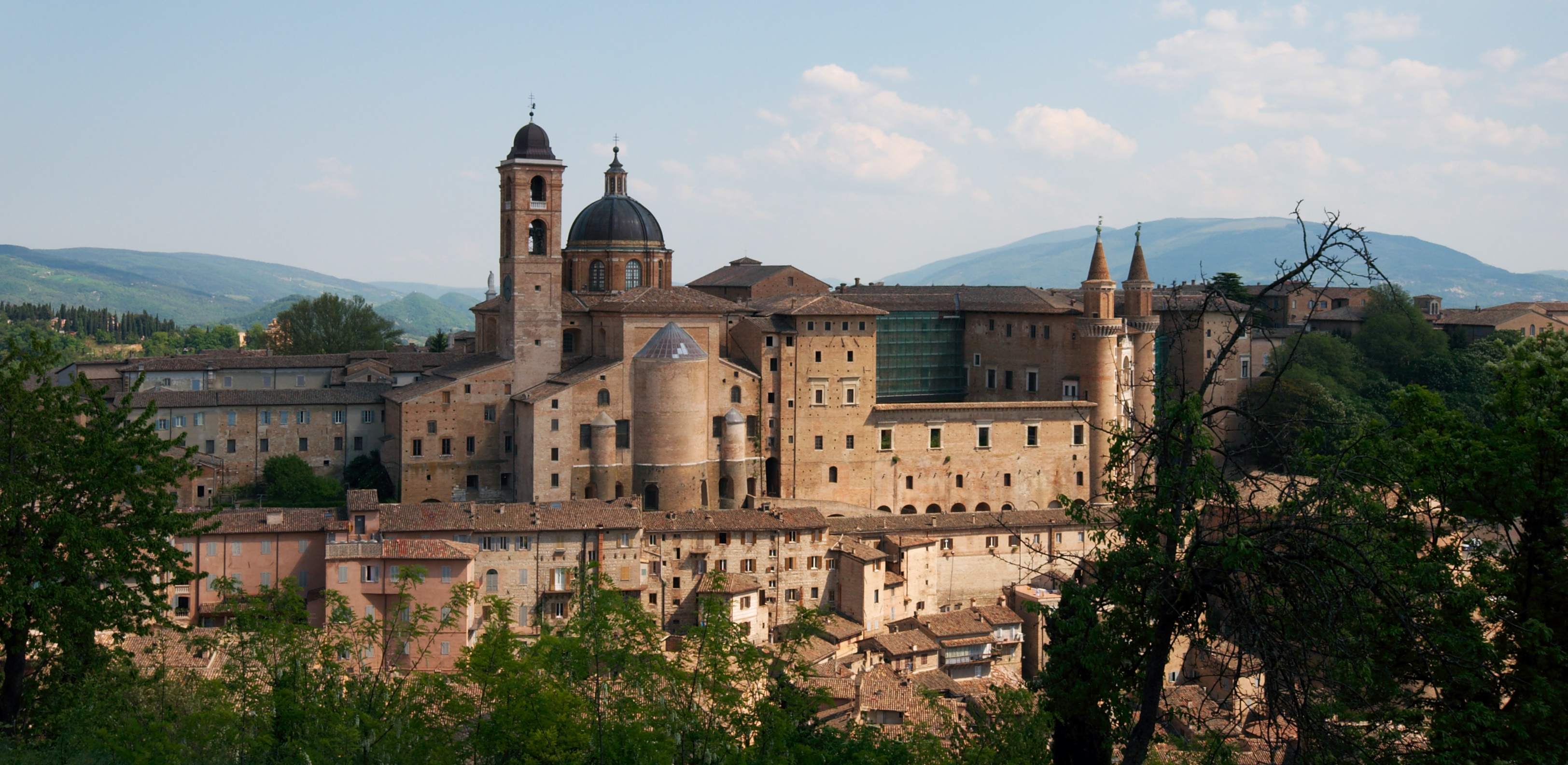 Veduta della città di Urbino dalla collina del castello. Si ammira la Cattedrale e il Palazzo Ducale sulla sinistra.